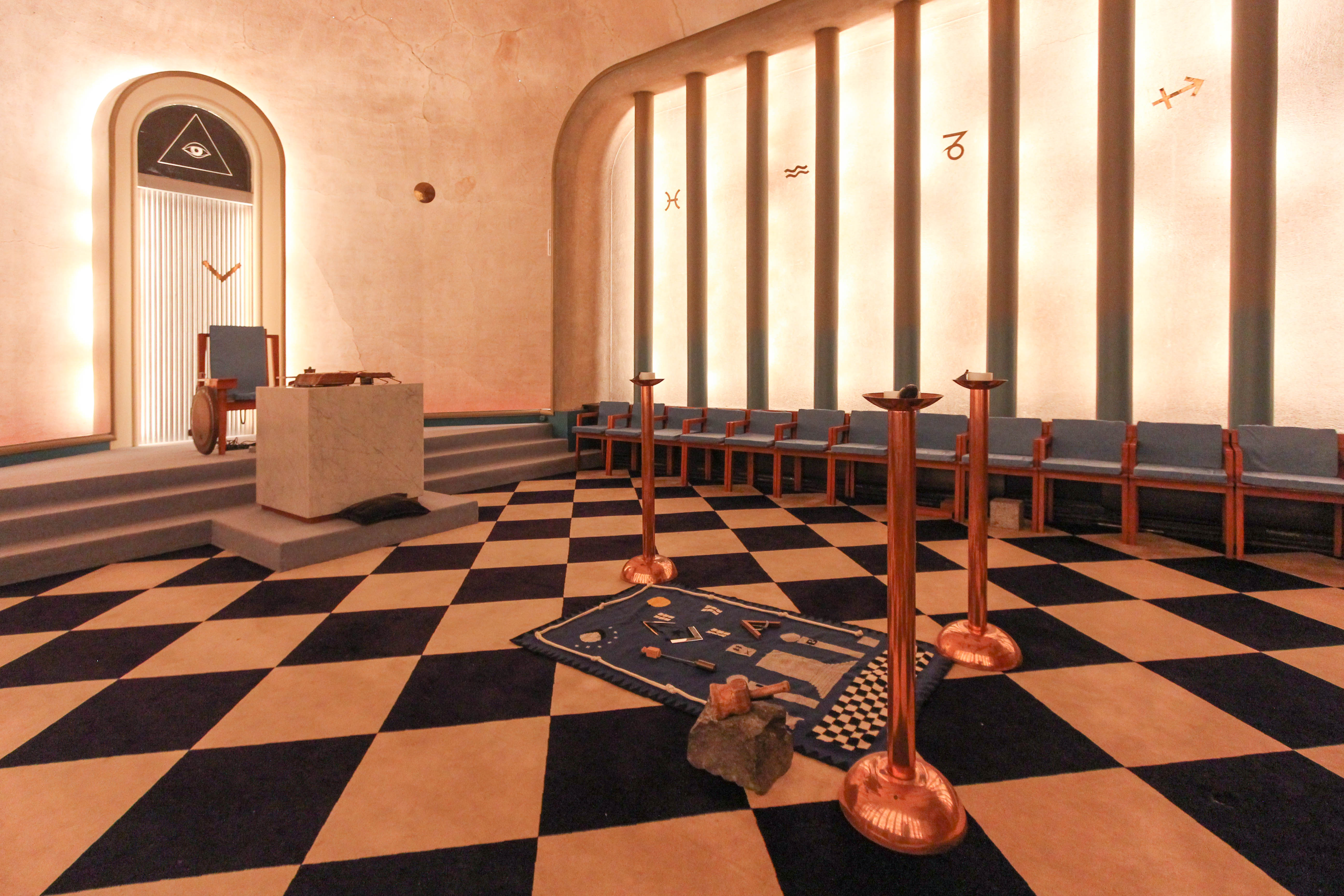 Interieur van de Baanderstempel in de vrijmetselaarsloge in Sneek. Links in beeld het 'Oosten' met de 'zuivere kubiek' met daarachter de stoel van de Voorzittend Meester, op de voorgrond het 'tableau' met symbolische werktuigen en op de achtergrond de 'zuiderkolom' voorzien van zitplaatsen en zuilen met de tekens van de dierenriem.